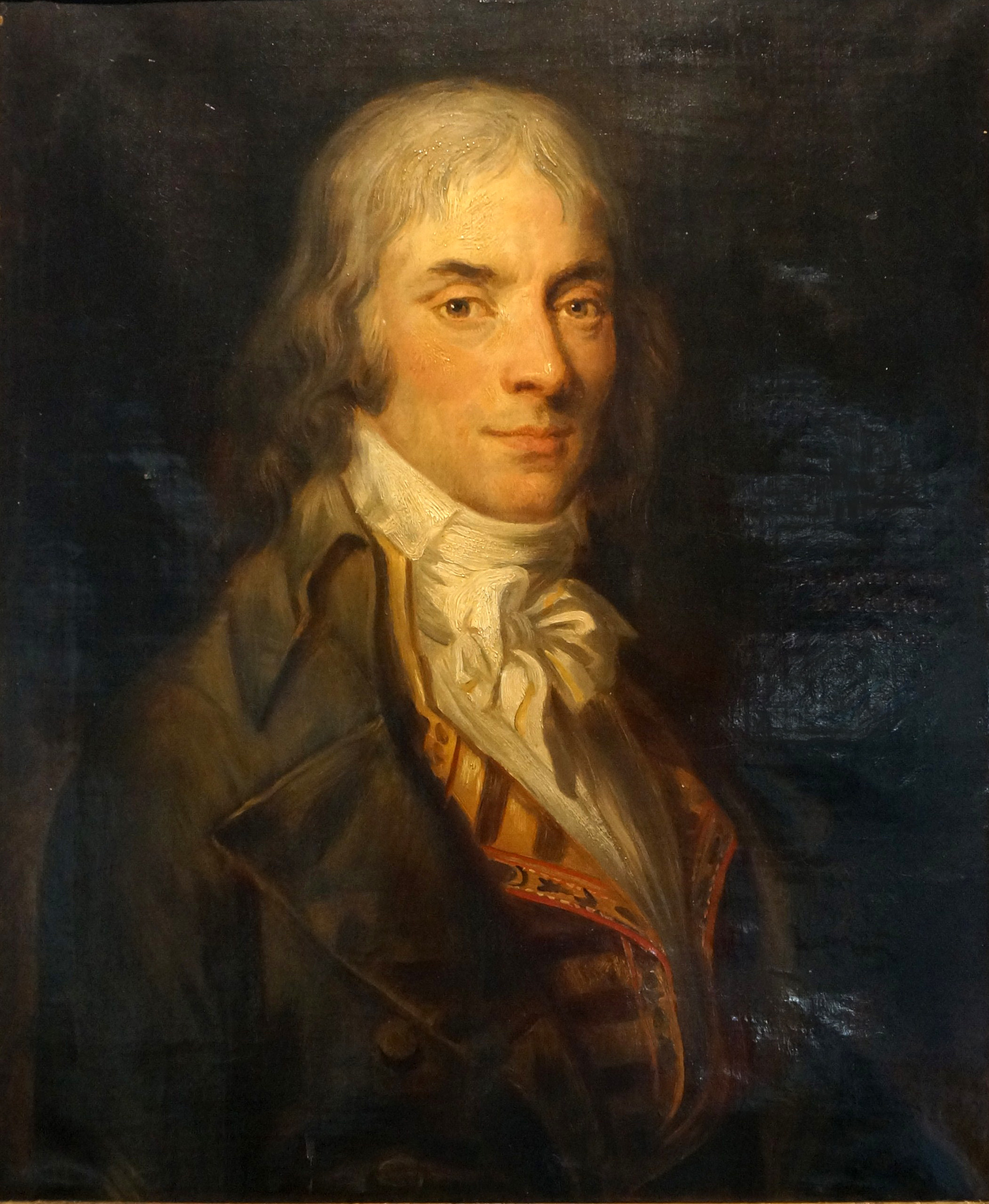 Portrait de Etienne Nicolas Mehul (1763-1817)